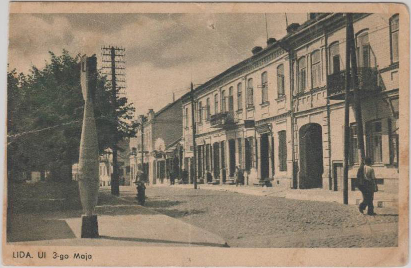 Беларуская (тарашкевіца): Ліда (Lida), вуліца Каменская (vulica Kamienskaja) ад крыжаваньня зь Віленскай (vulica Vilenskaja)